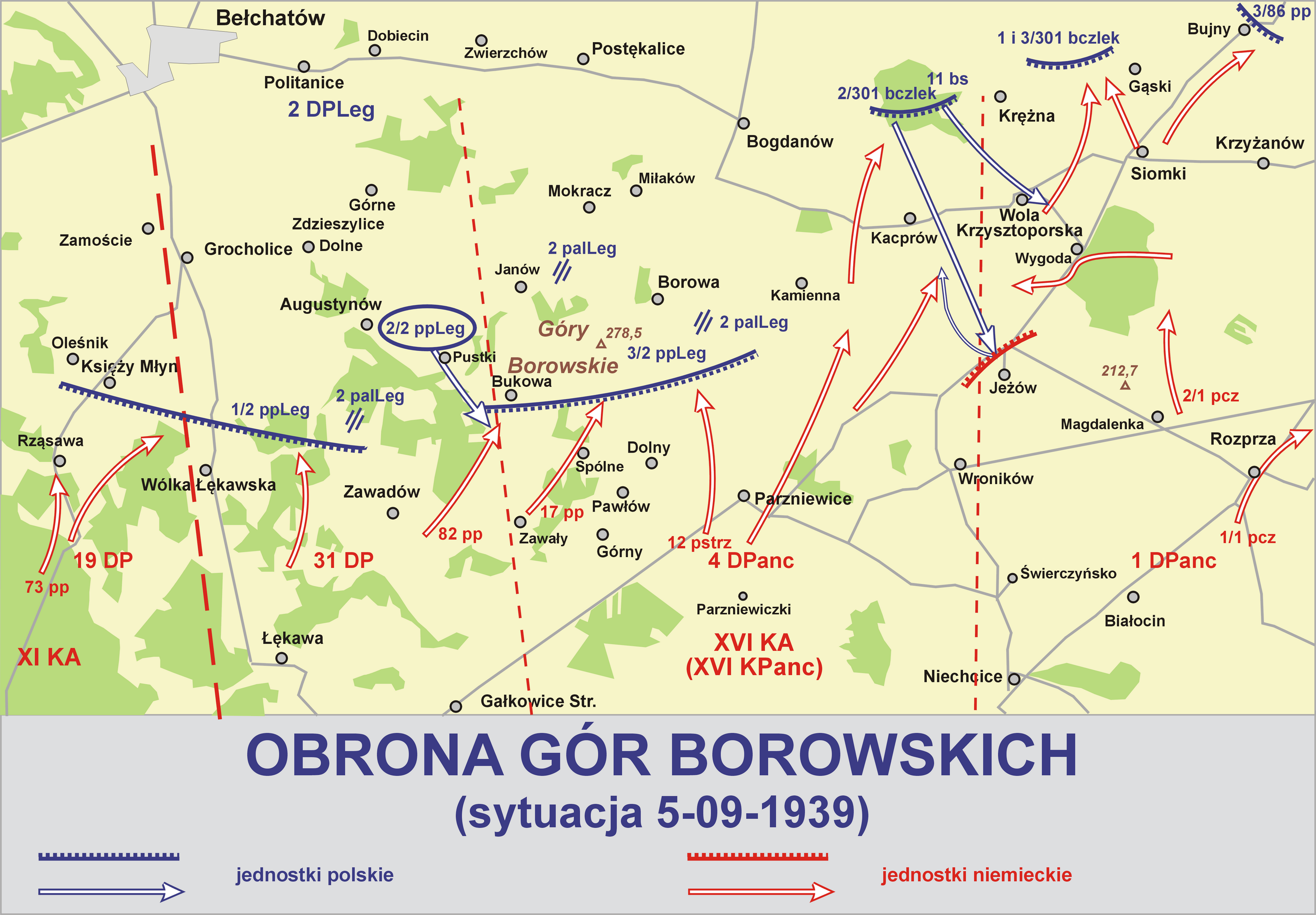 Obrona Gór Borowskich (położenie 05.09.1939)